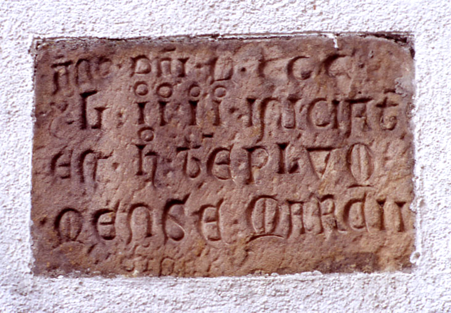 Inschriftstein an der Katharinenkapelle in Landau; Bauinschrift von 1344, schwer lesbar, Schrifttyp Unziale: ANO DÑI · M·CCC / XL iiii ·INICIAT / EST· H·TEMPLVM / MENSE · MARCII – seit der Renovierung 2008 aus konservatorischen Gründen im Innenraum